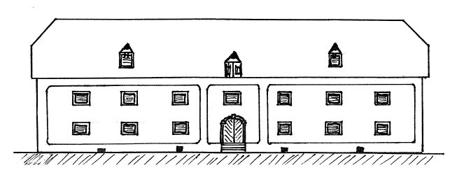 Das 1750 auf dem Plaimstein errichtete Kornmagazin wurde 1875 gekauft und zur evangelischen Pfarrkirche umgebaut.